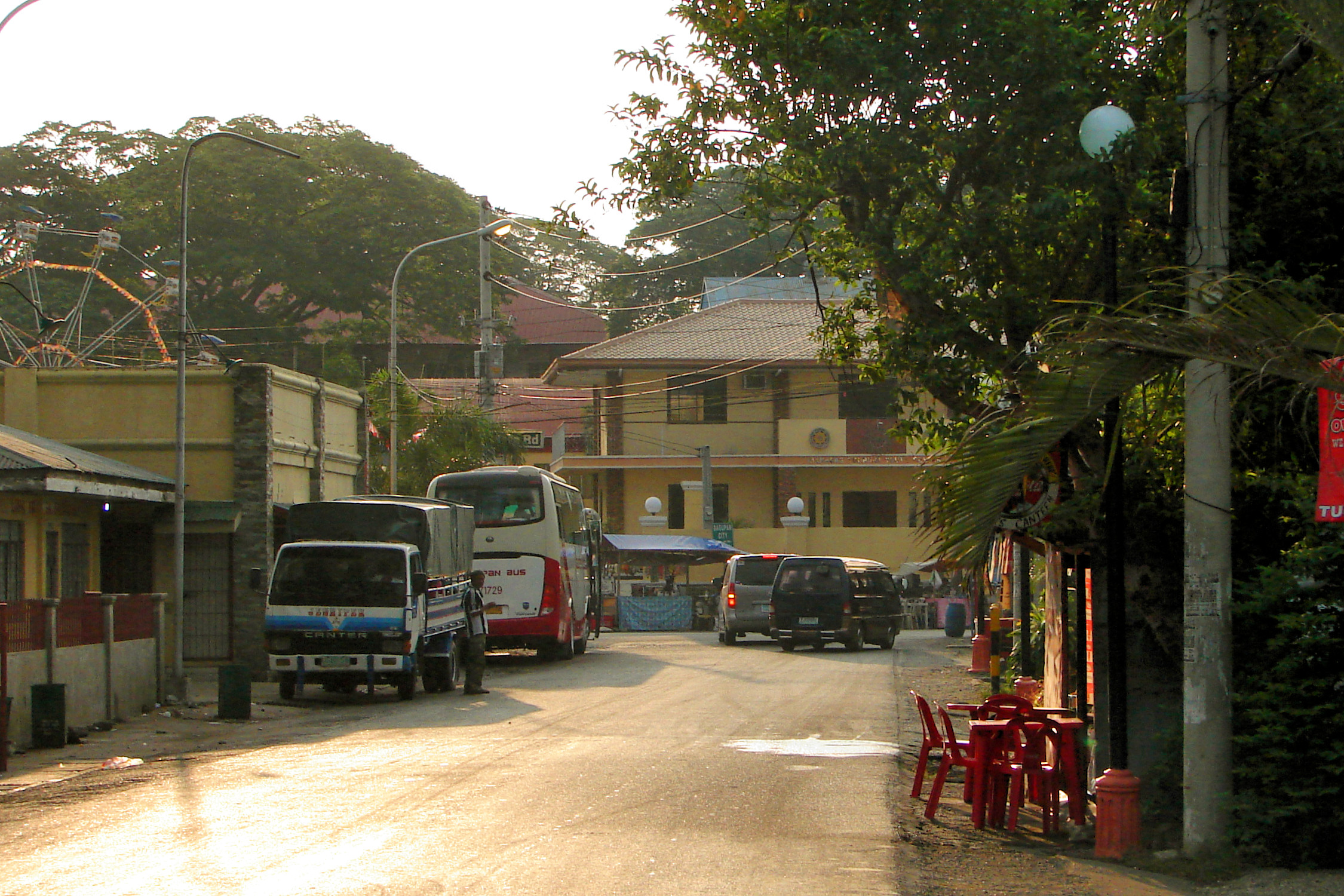 Manaoag, Pangasinan, Philippines